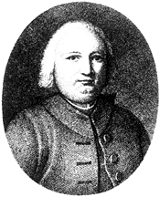 Tratto da